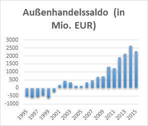 Außenhandelssaldo Österreichs 1980-2015